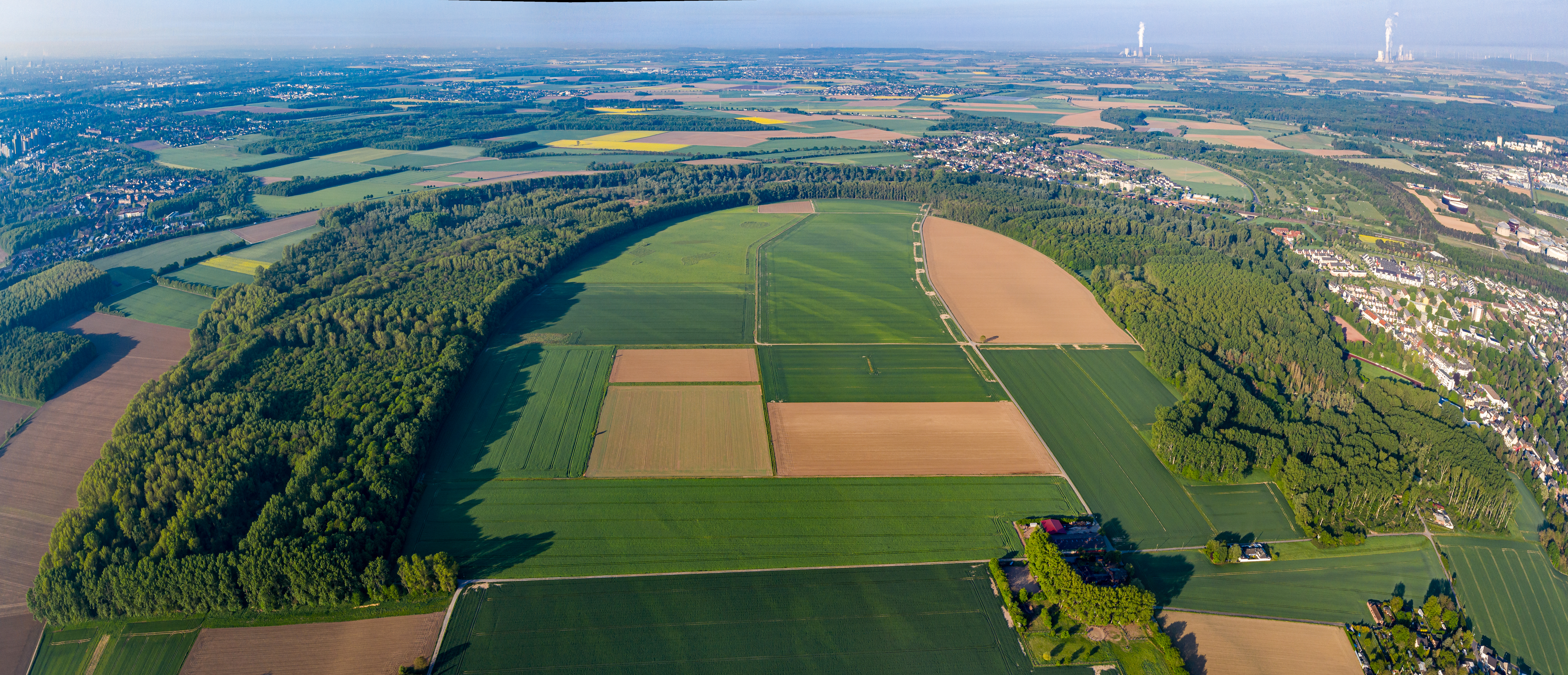 Worringer Bruch, Panorama aus fünf Aufnahmen